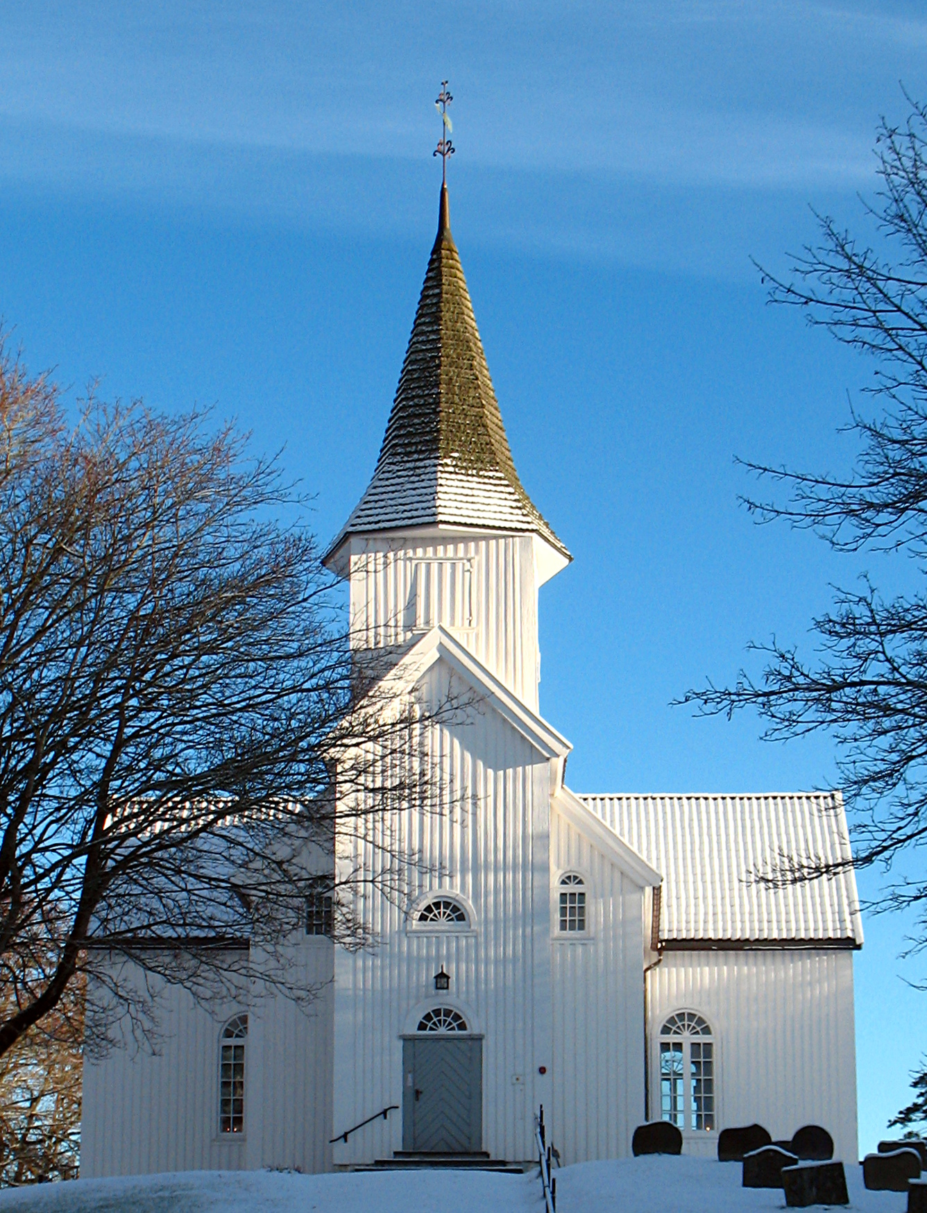 Øvrebø kirke er en korskirke i tre fra 1800 på Øvrebø i Vennesla kommune, Vest-Agder. Den brukes av Øvrebø menighet som er en del av Vennesla fellesråd, Otredal prosti i Agder og Telemark bispedømme. Fra vest.